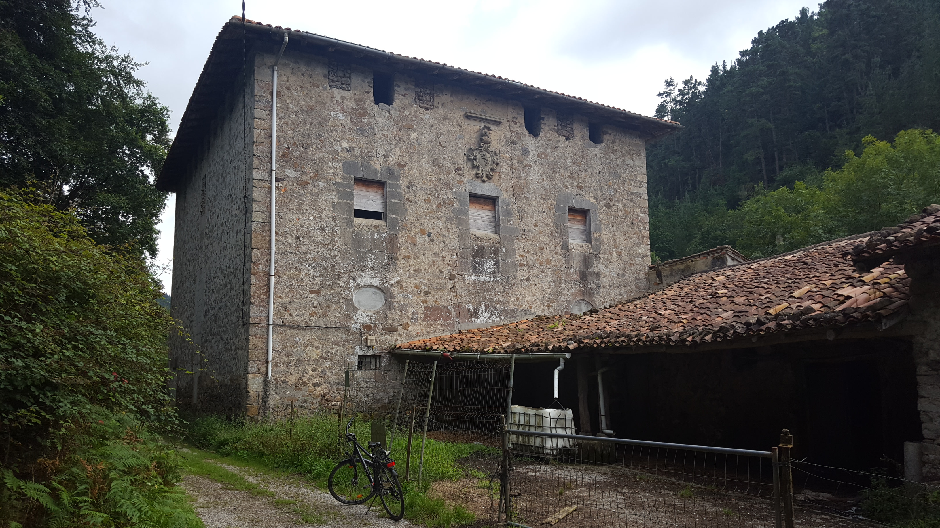 Lea ibaiko Bengolea Dorrea Gizaburuagan